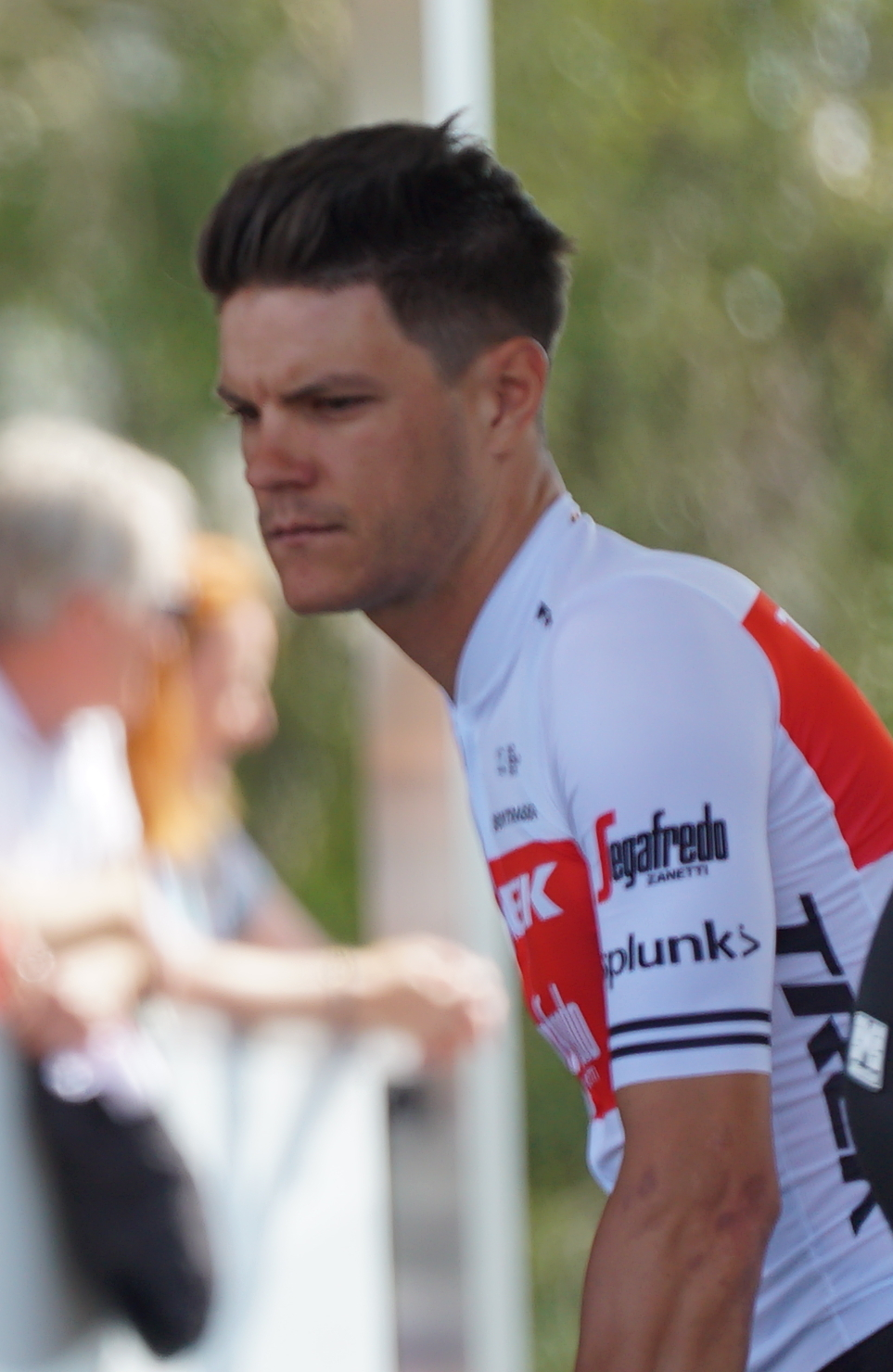 avant le départ de l'étape à Reims.